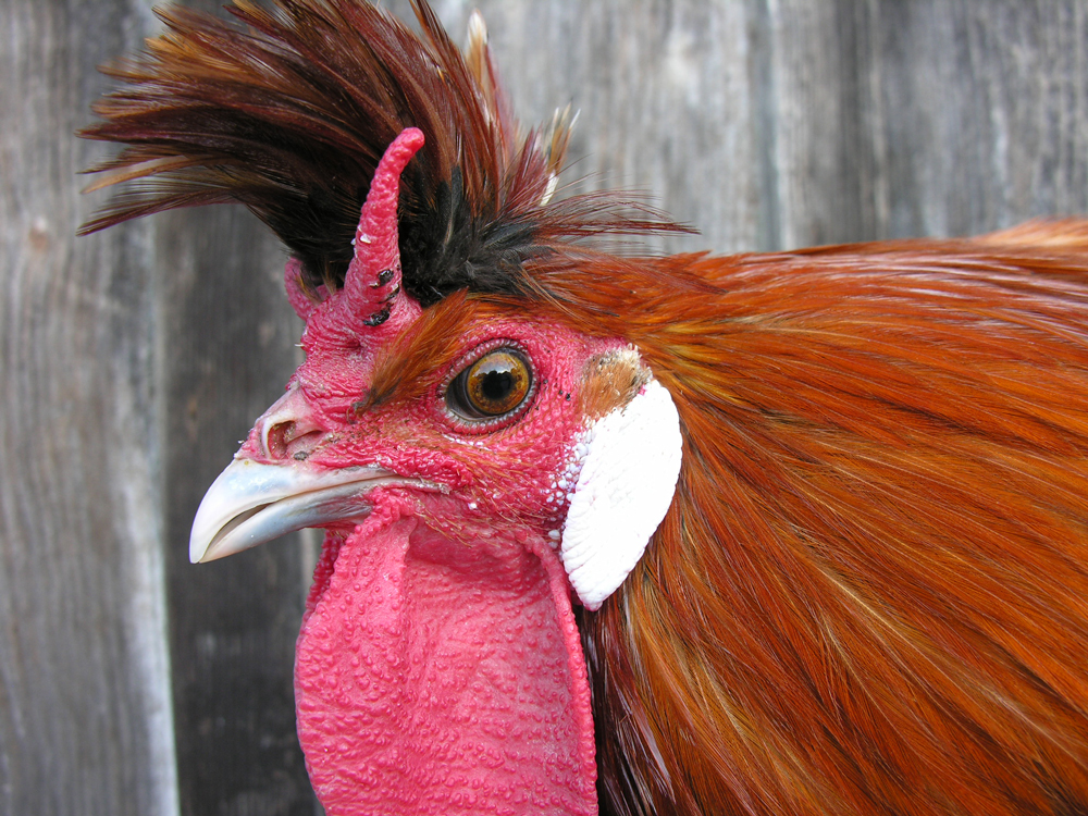 Appenzeller Spitzhauben-Hahn